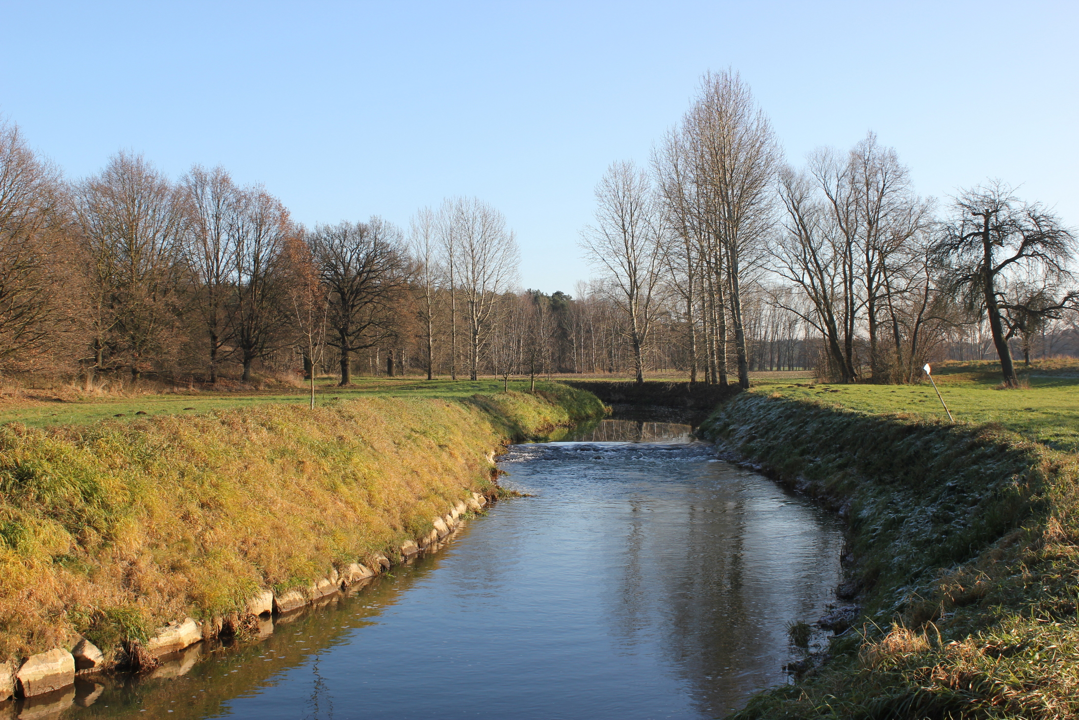 Hornjoserbsce: Sprjewja w Lěskeji (gmejna Malešecy).